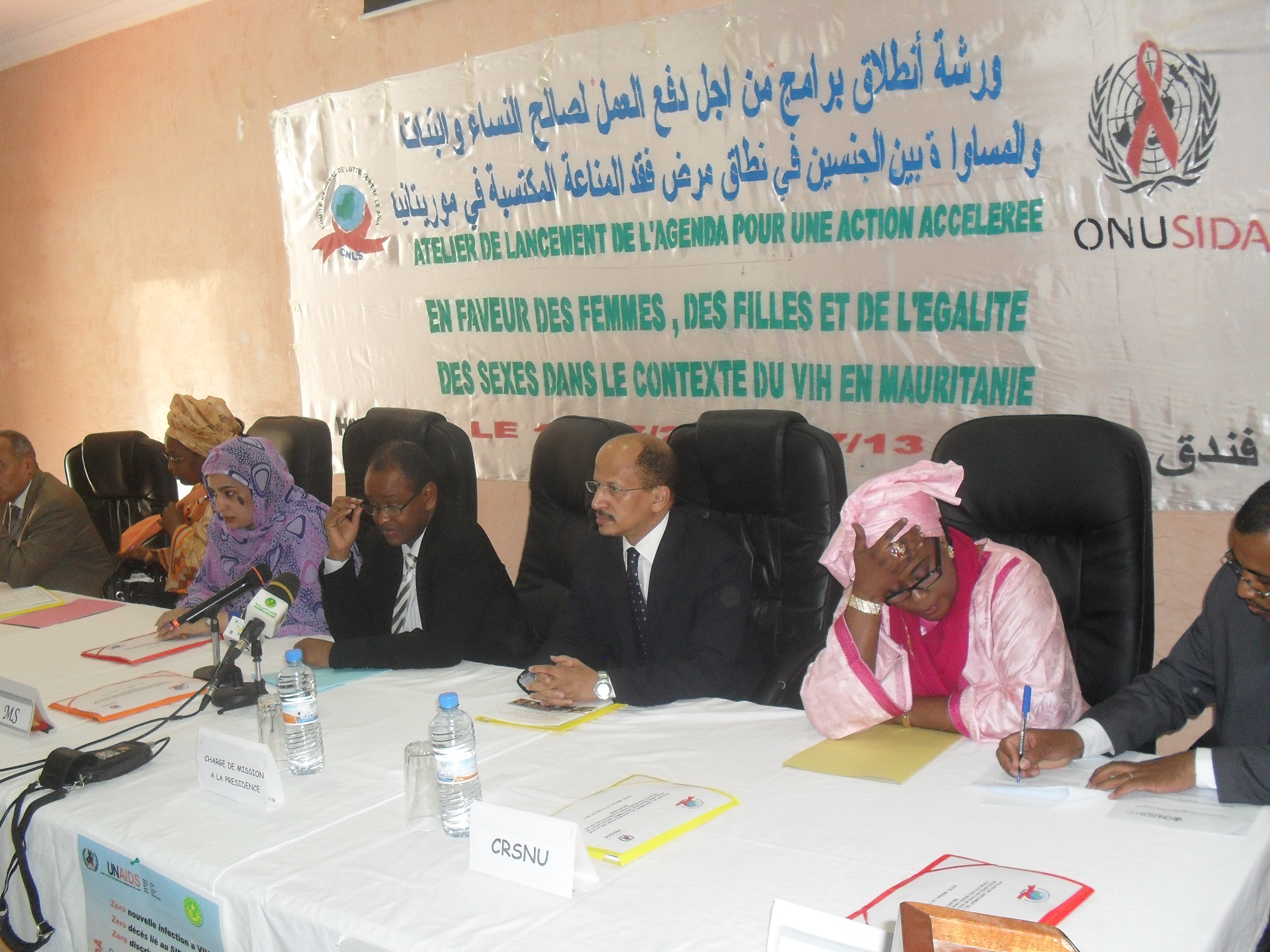 [Jemal Oumar] Officials from the Mauritanian government meet with representatives of HIV/AIDS NGOs at a recent conference in Nouakchott. مسؤولون في الحكومة الموريتانية يجتمعون بممثلي الصندوق الدولي لمكافحة الإيدز خلال مؤتمر عقد مؤخرا في نواكشوط Des responsables du gouvernement mauritanien rencontrent des représentants d'ONG de lutte contre le VIH/SIDA lors d'une récente conférence à Nouakchott.